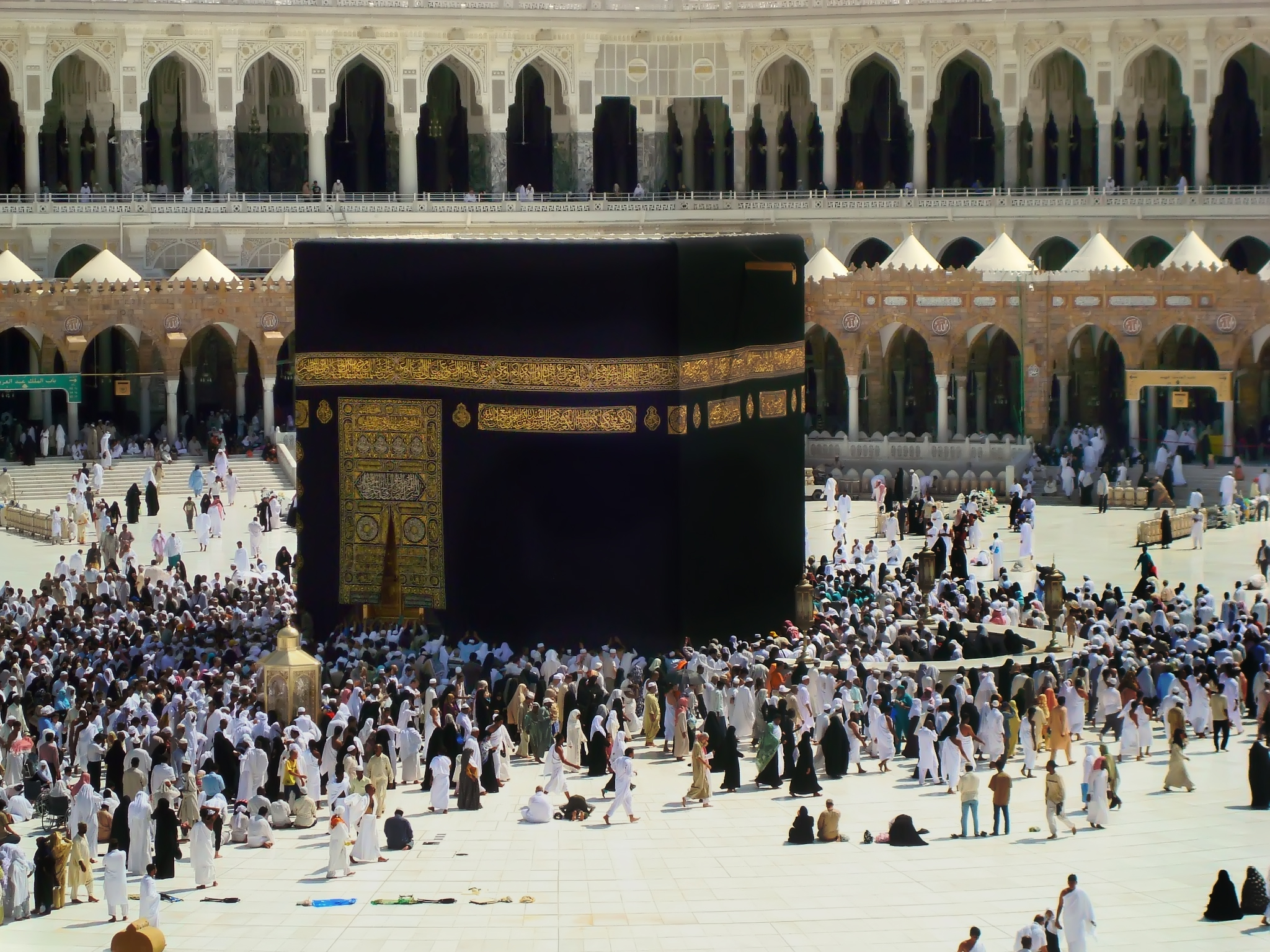 Kaaba, Mecca, Saudi Arabia.